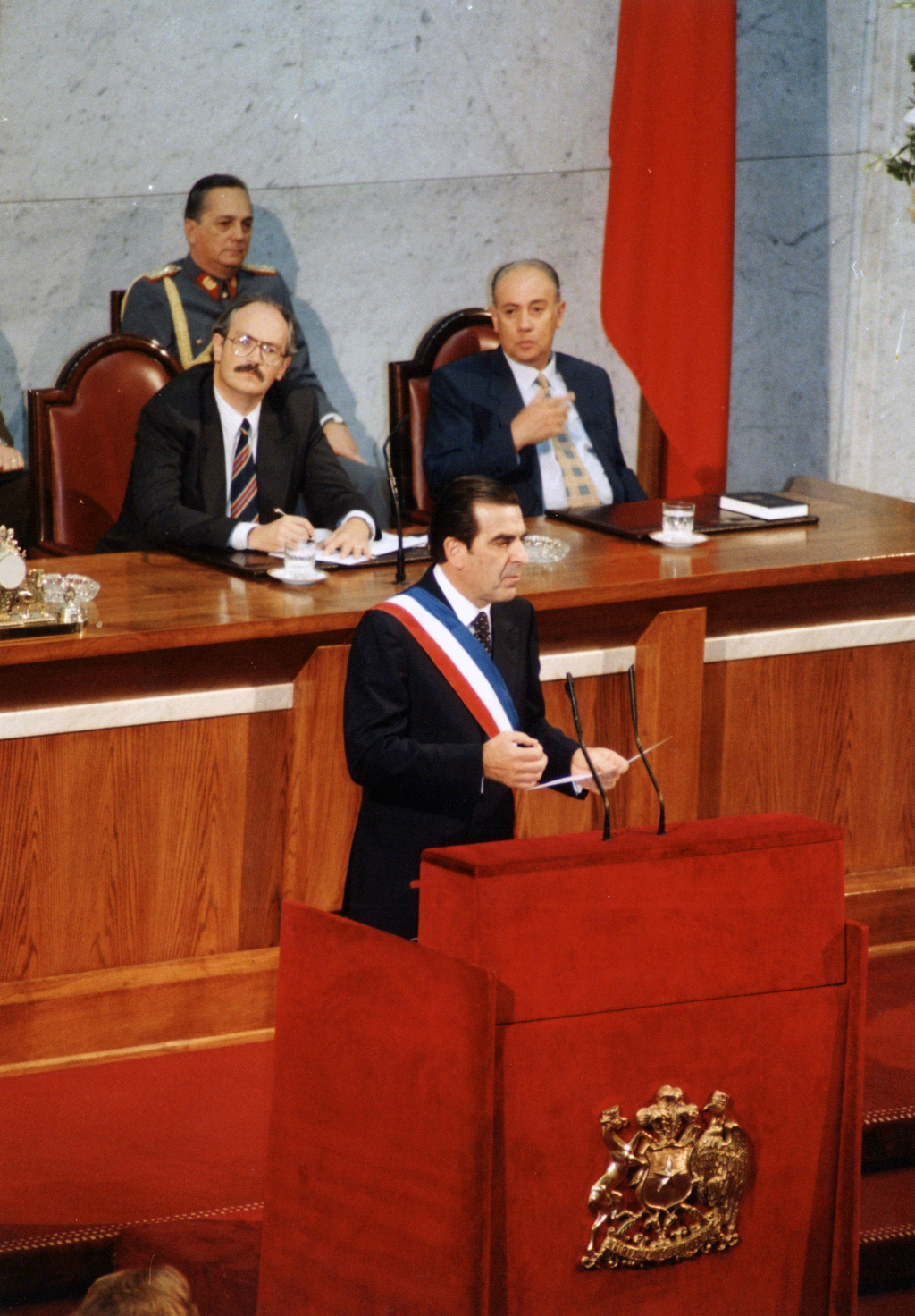 Eduardo Frei Ruiz Tagle dando su cuenta pública ante el Congreso Pleno en 1995.